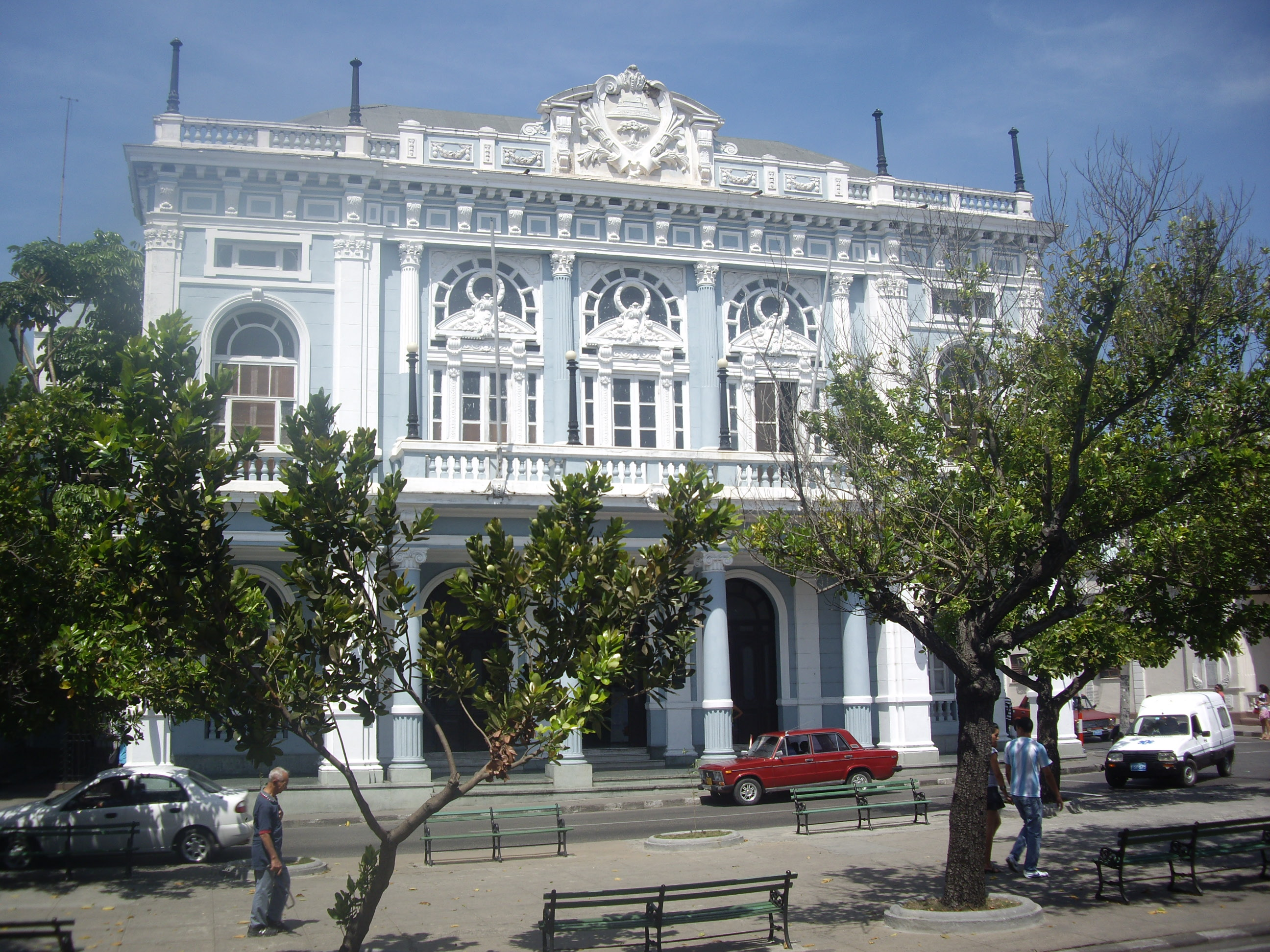 Antic Liceu i actual Biblioteca Provincial “Roberto García Valdés”. Cienfuegos, Cuba